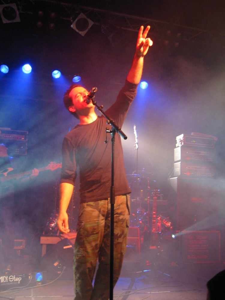 Nick D'Virgilio bei einem Konzert am 03.10.2005 in Oberhausen, Zentrum Altenberg